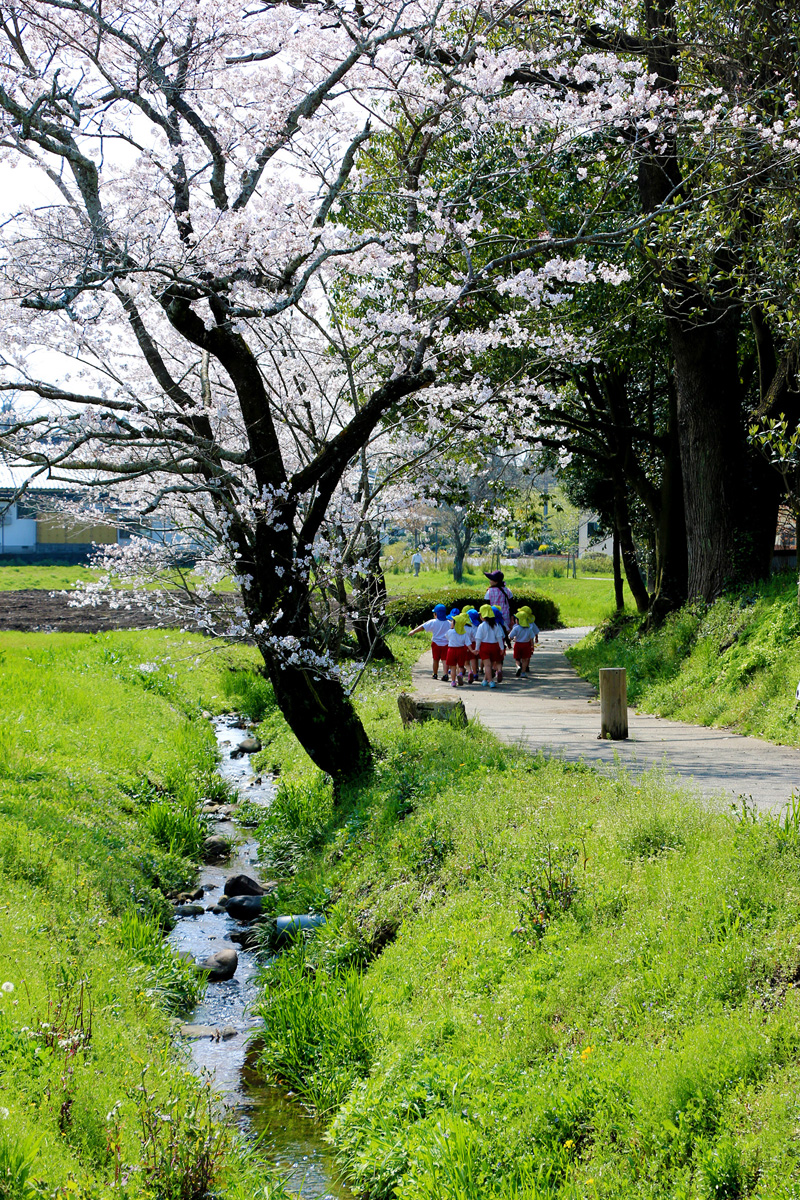 桜が満開の記紀の道 Canon EOS 70D + EF-S 18-135mm F3.5-5.6 IS STM